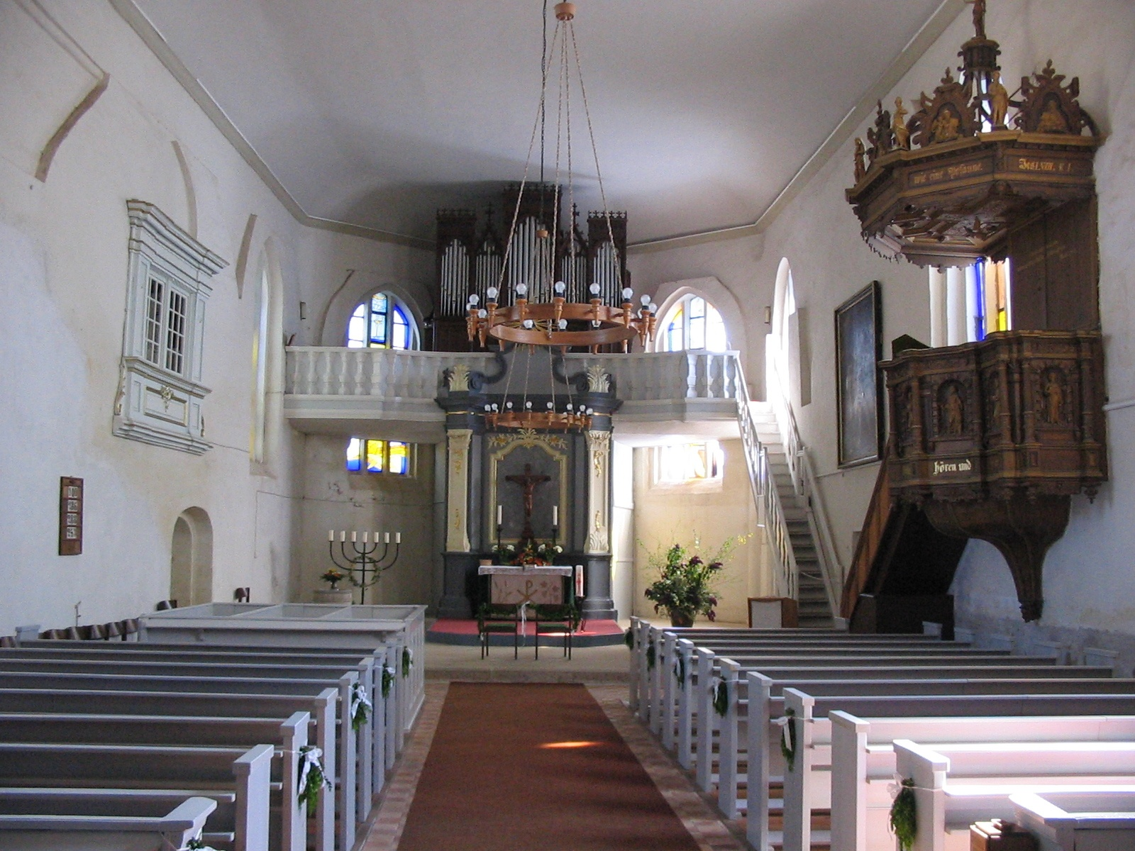 Kirche in Neustadt-Glewe (Germany), Innenraum. Kanzel von dem Lübecker Bildschnitzer Tönnies Evers der Jüngere.